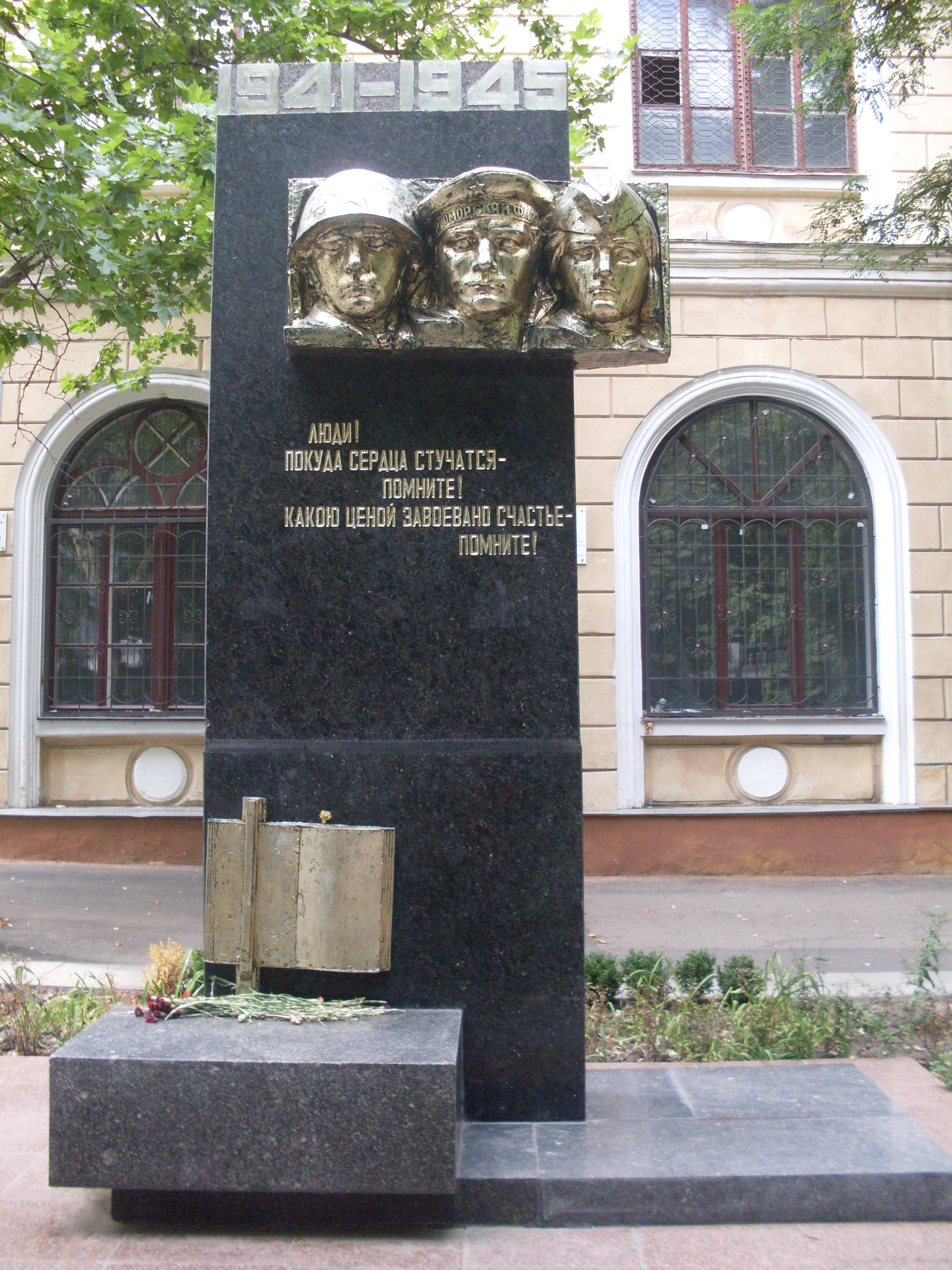 Памятник погибшим в ВОВ 1941-1945гг ОНУ